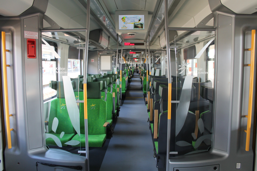 Przedział pasażerski elektrycznego zespołu trakcyjnego Newag Impuls 45WE-004.